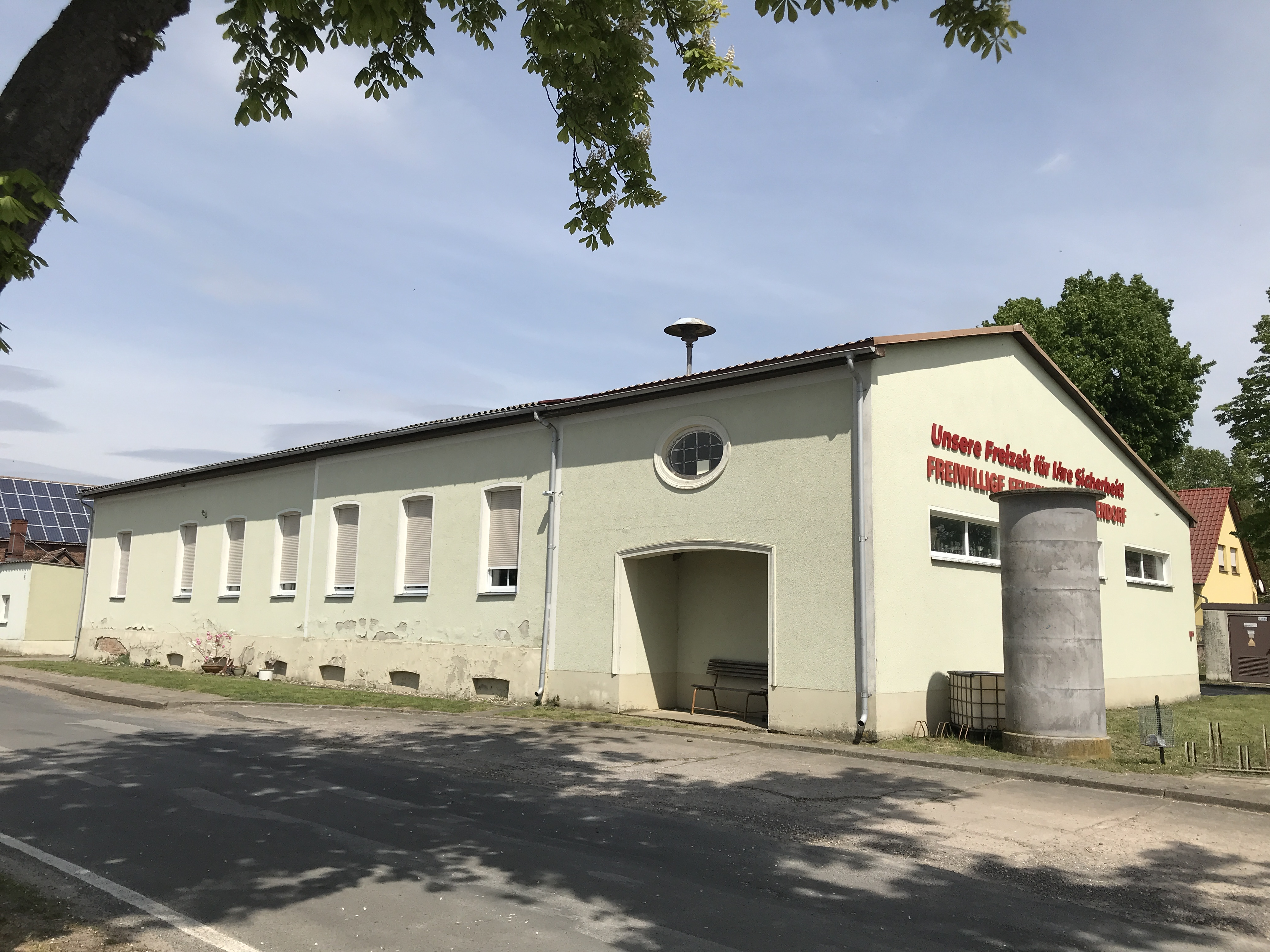 Gräfendorf, ein Ortsteil der Gemeinde Niederer Fläming in Brandenburg